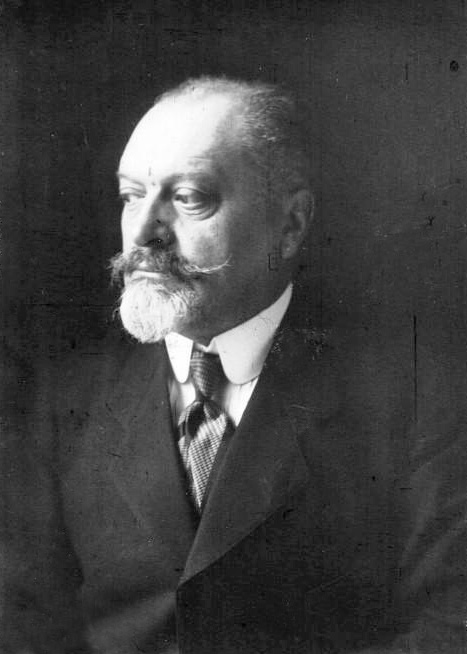 M. Raynaud, ancien ministre : photographie de presse